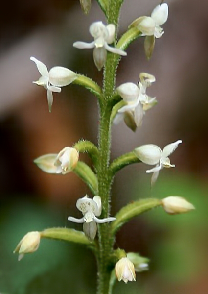 Cranichis diphylla, Orchideen (Orchidaceae) – Kolumbien/Colombia: Dpto. Magdalena, Sierra Nevada de Santa Marta, Reserva Natural de las Aves El Dorado, El Dorado EcoLodge: "Kogihabs", ca. 7 km SE Minca, ca. 2000 m